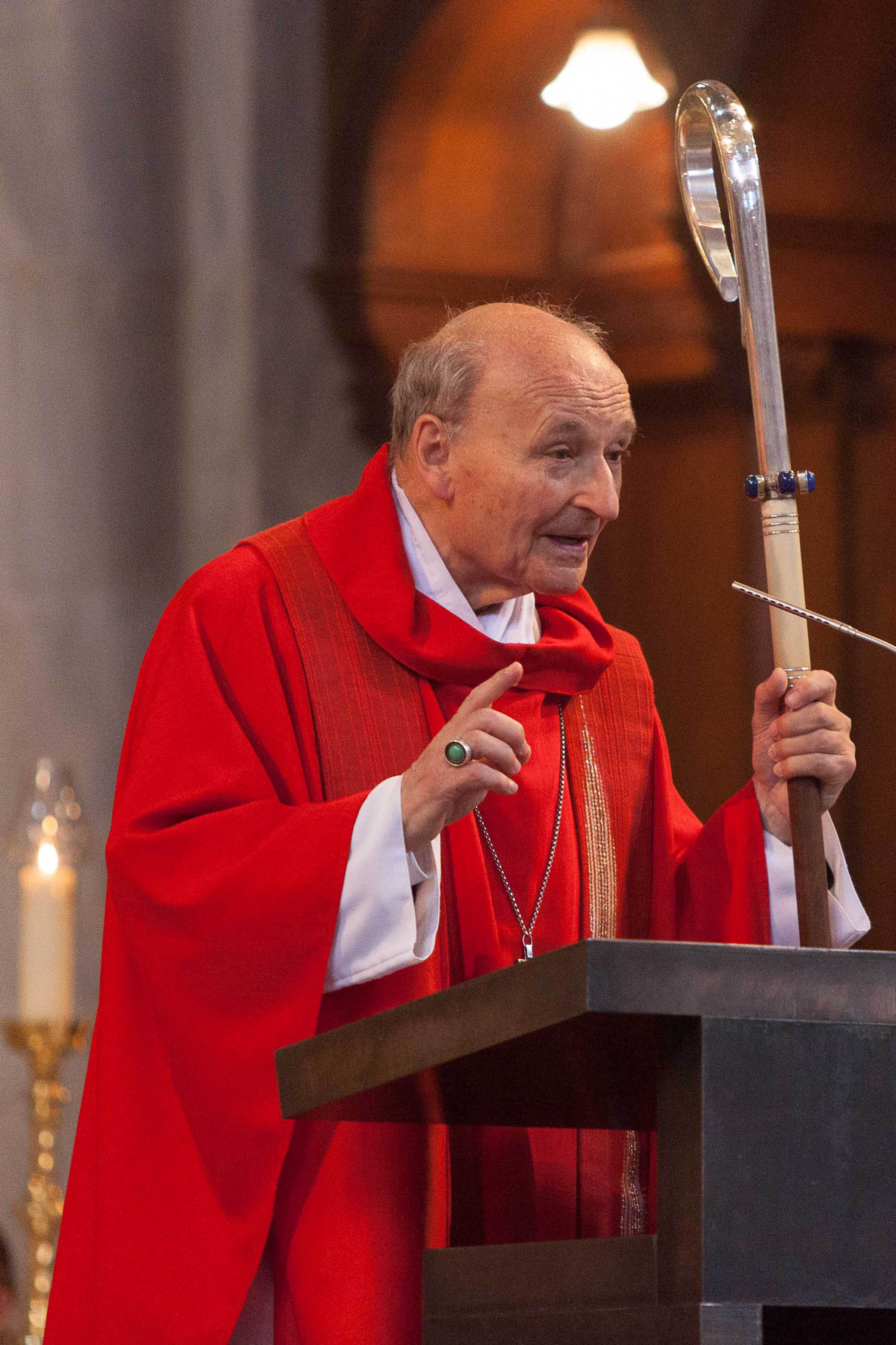 Altabt Odilo Lechner am 23.06.2012 anlässlich des Spende des hl. Sakraments der Firmung in der Pfarrkirche St. Benno, München